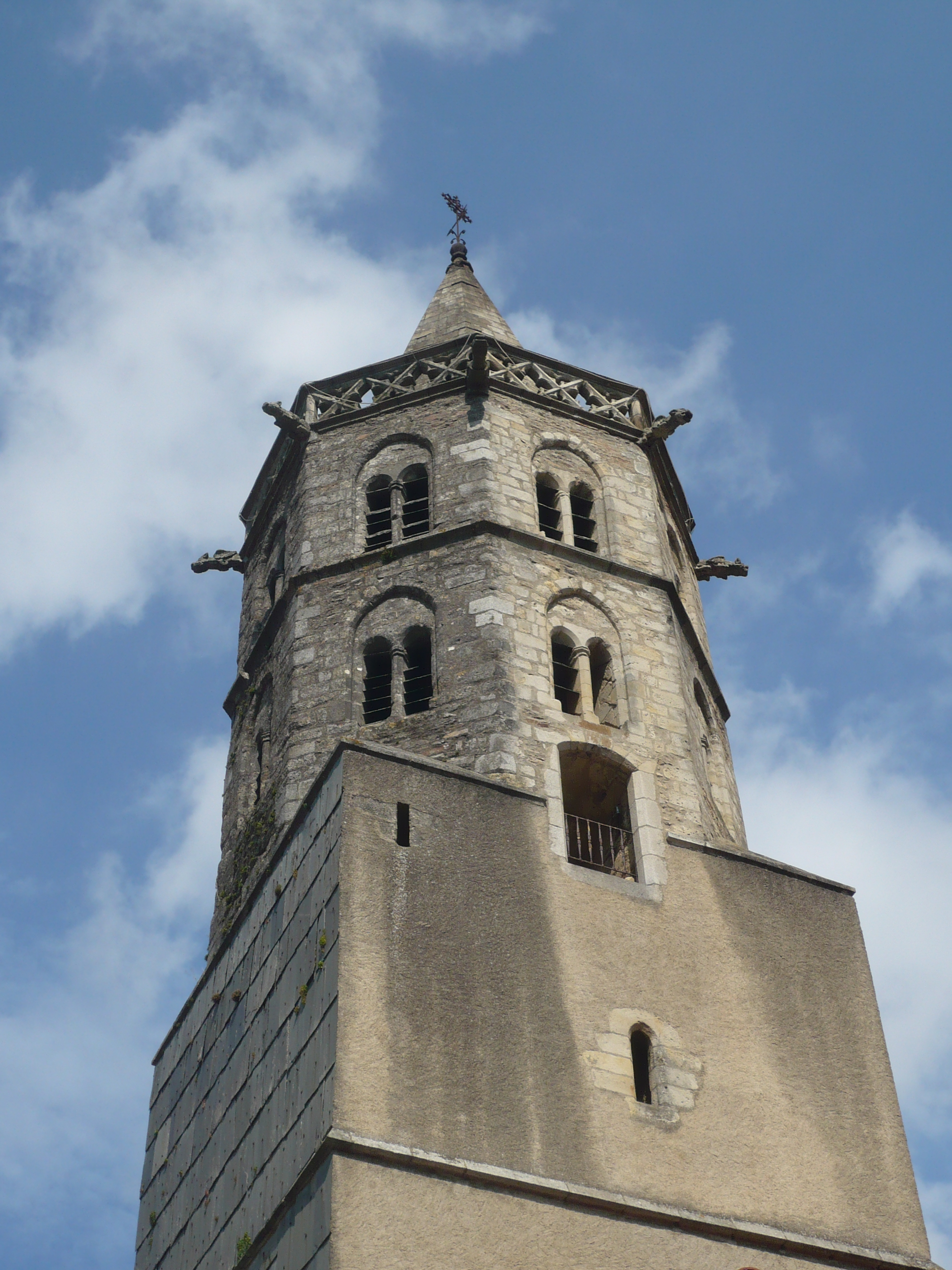 Tour octogonale de l'Église sur la commune de Saint-Amans-Soult dans le département français du Tarn.